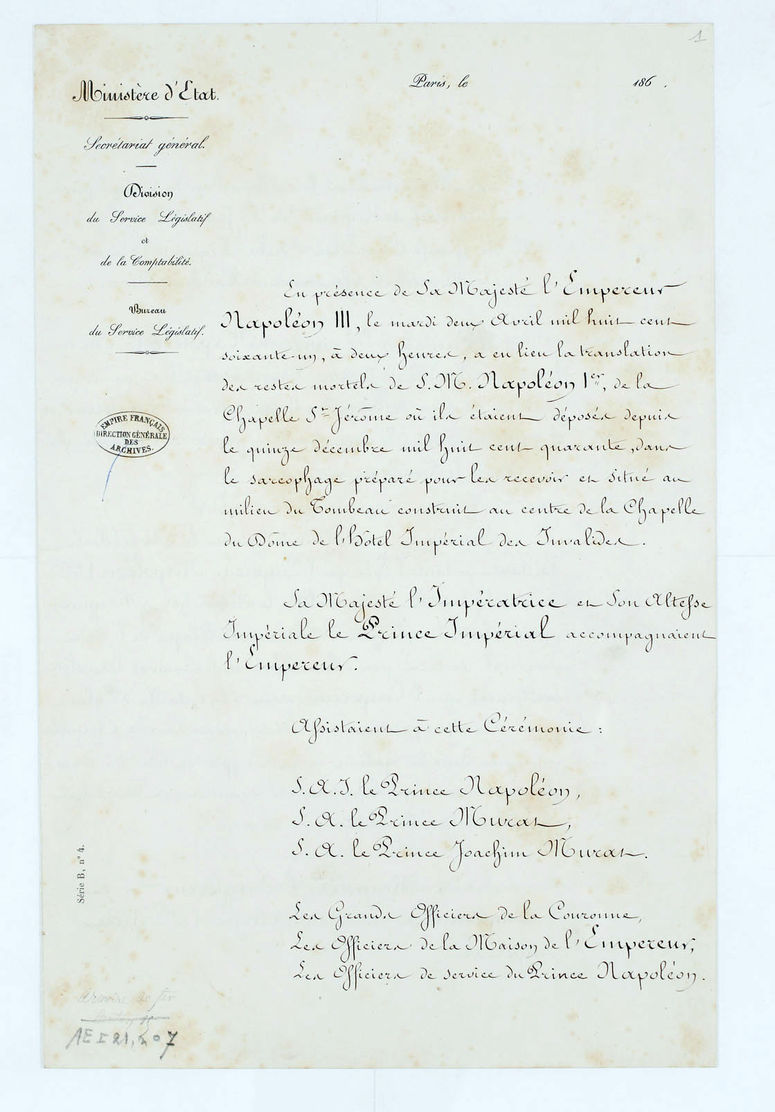 Expédition du procès-verbal de la translation des restes mortels de l’empereur Napoléon Ier dans le sarcophage du tombeau construit dans l’église de l’hôtel des Invalides.Don de Napoléon III.